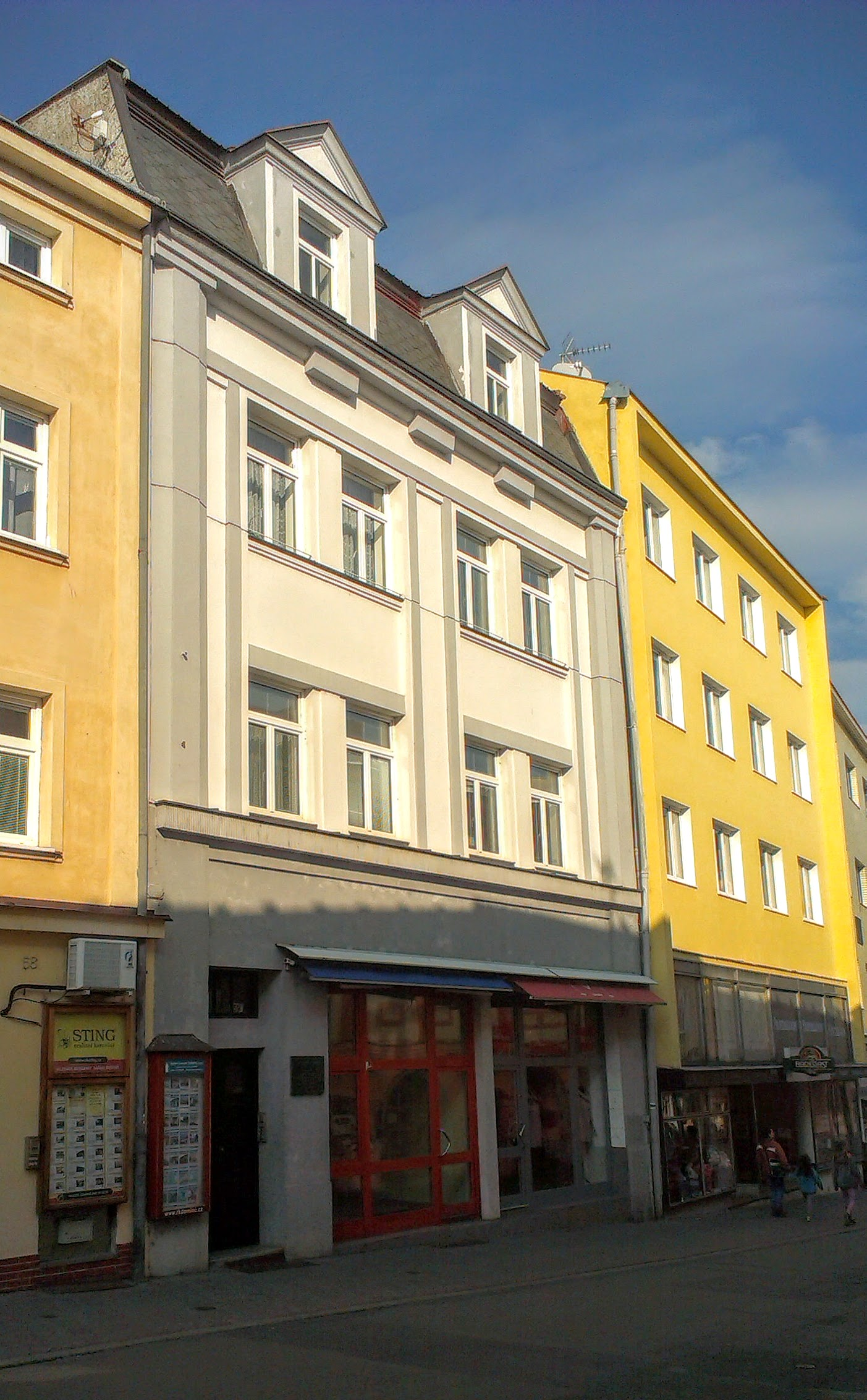 Rodný dům orientalisty Jana Rybky